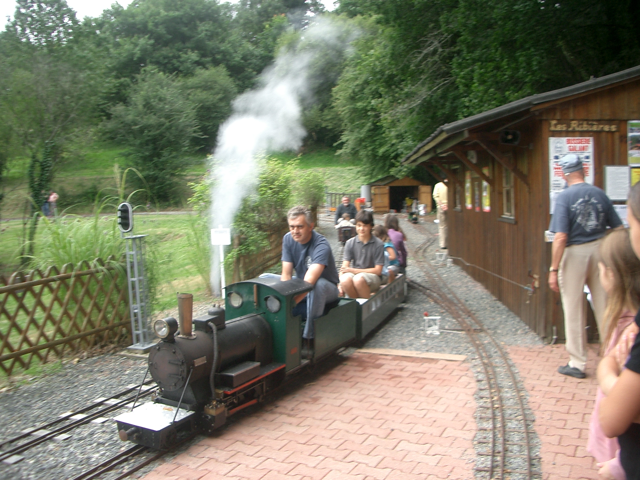 Un convoi en gare du petit chemin de fer des Ribières